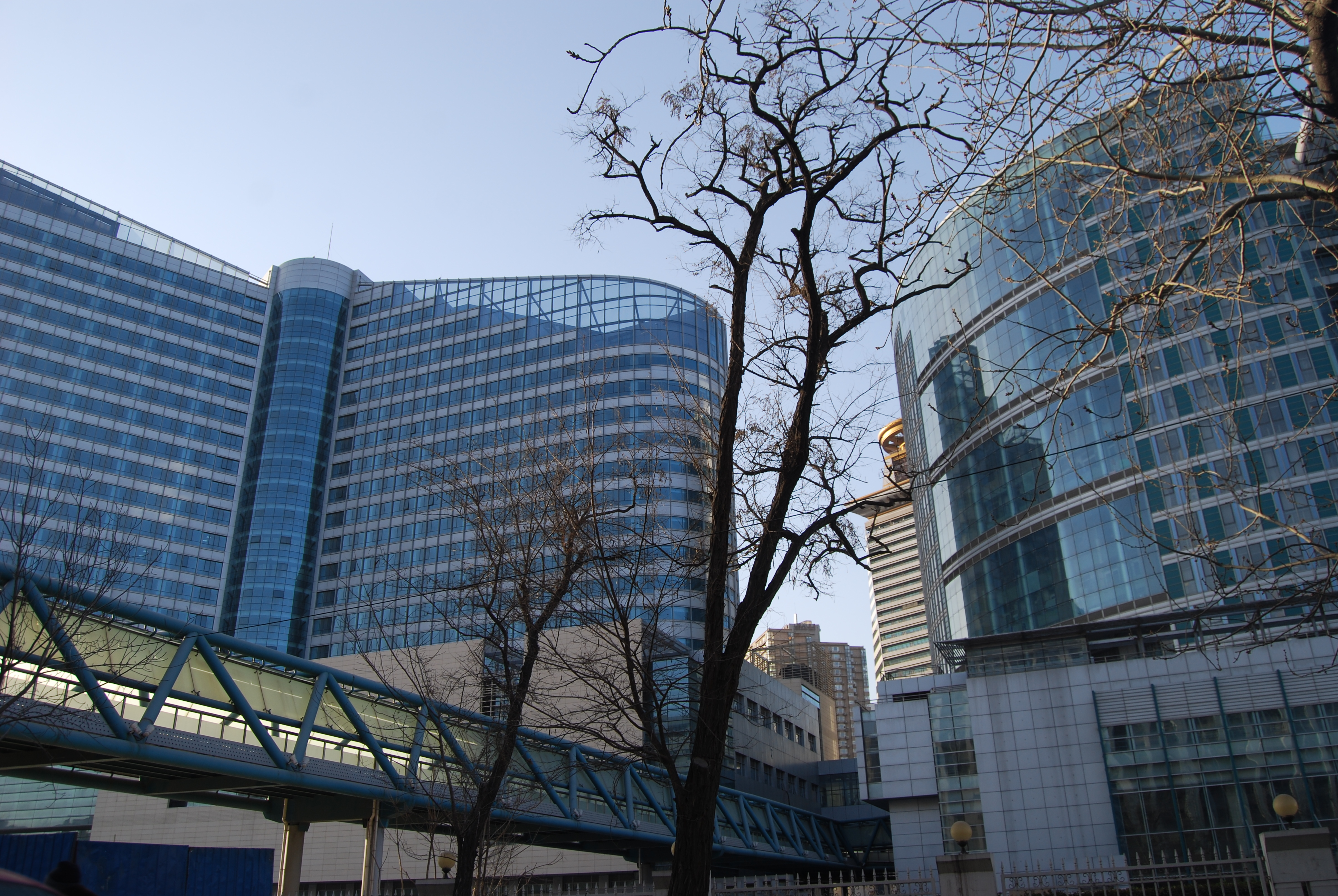 天津医科大学总医院